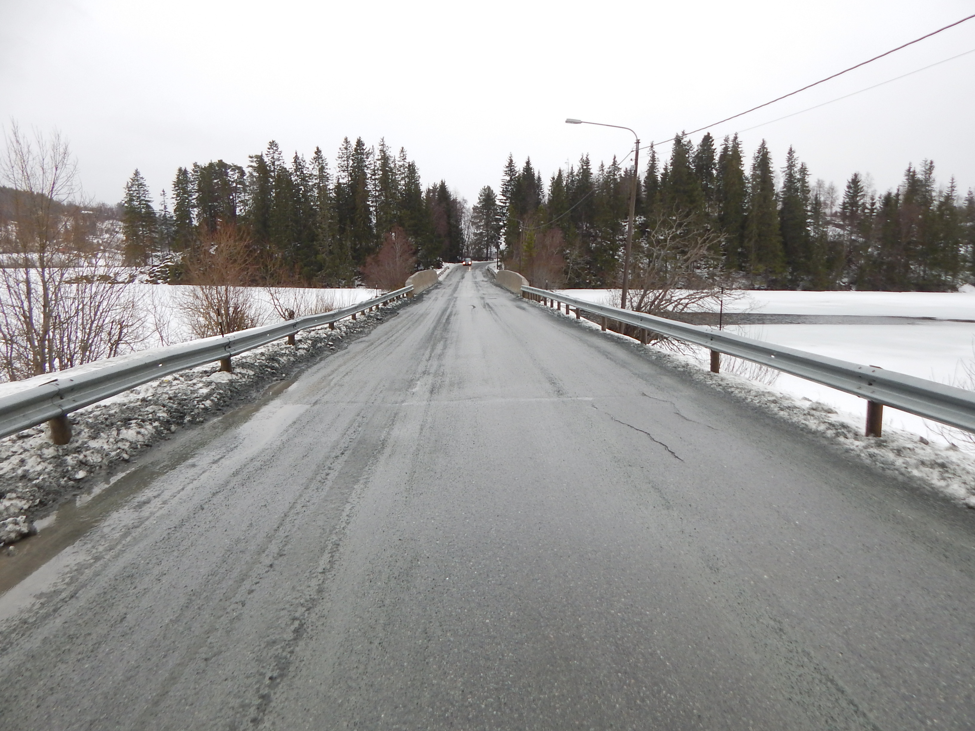 Engelsåsvegen (fylkesvei 877) over Solbakken bru ved Jonsvatnet (Litlvatnet)